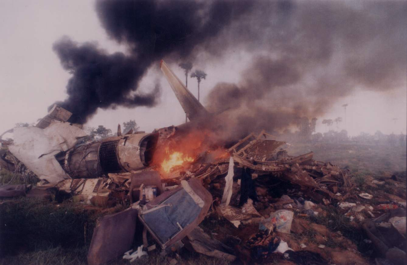 970903중앙119구조본부 베트남 항공 815편 추락 사고 출동